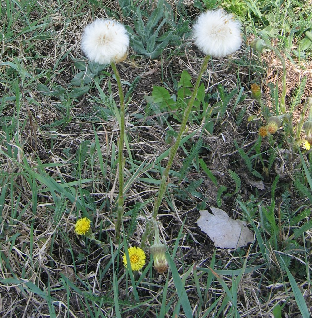 Autoriaus nuotrauka, 2006.05.13. Šalpusnis (Tussilago farfara). Nuotrauka gali būti platinama pagal GFDL licenciją.